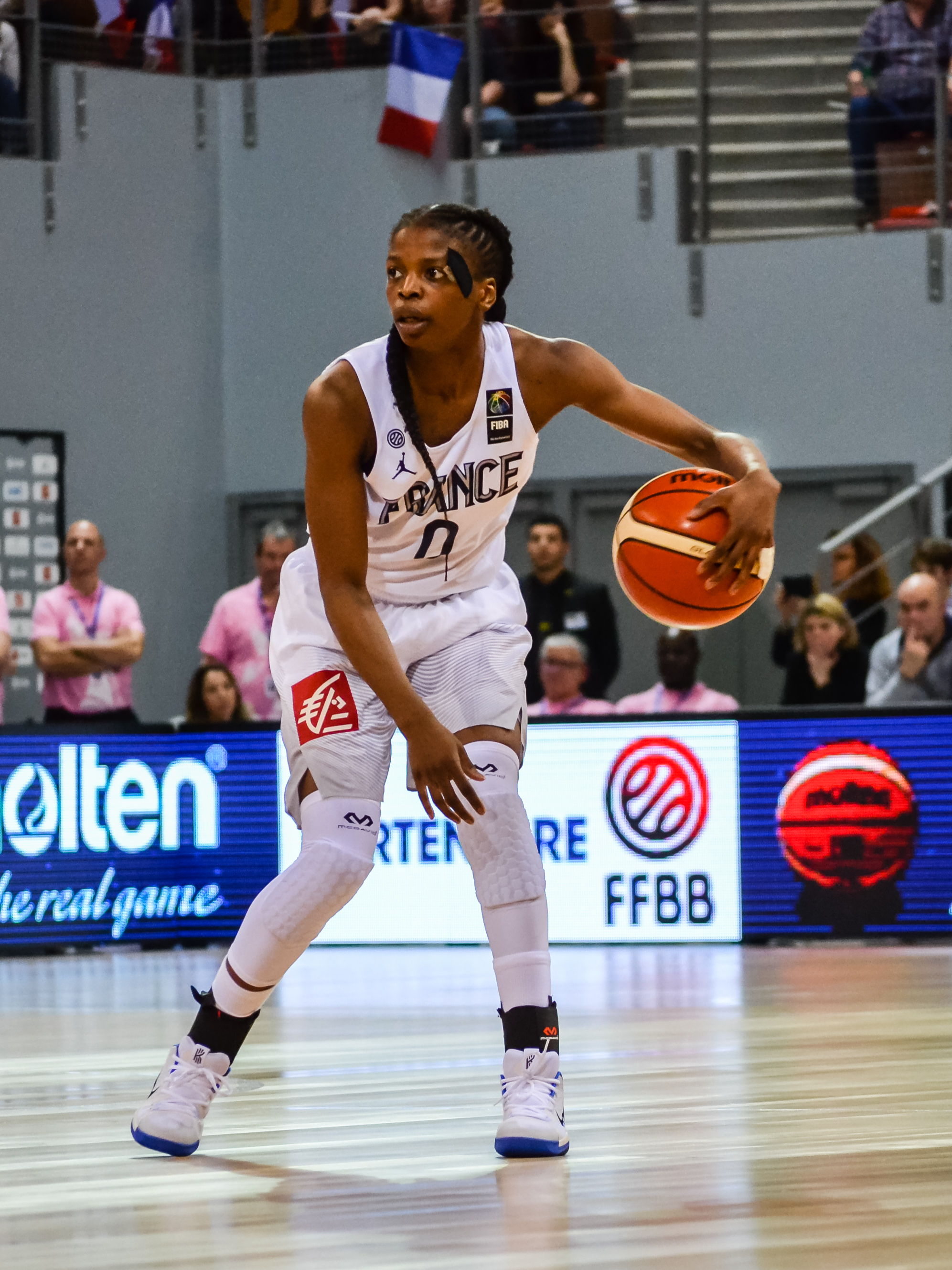 Rencontre de l'Equipe de France féminine de basket-ball contre la Finlande (90-40), comptant pour les qualifications à l'Euro 2019, le 14 février 2018 à Brest. C'était la première fois que la Brest Arena, d'une capacité de 5 000 spectateurs, accueillait un match international de basket.